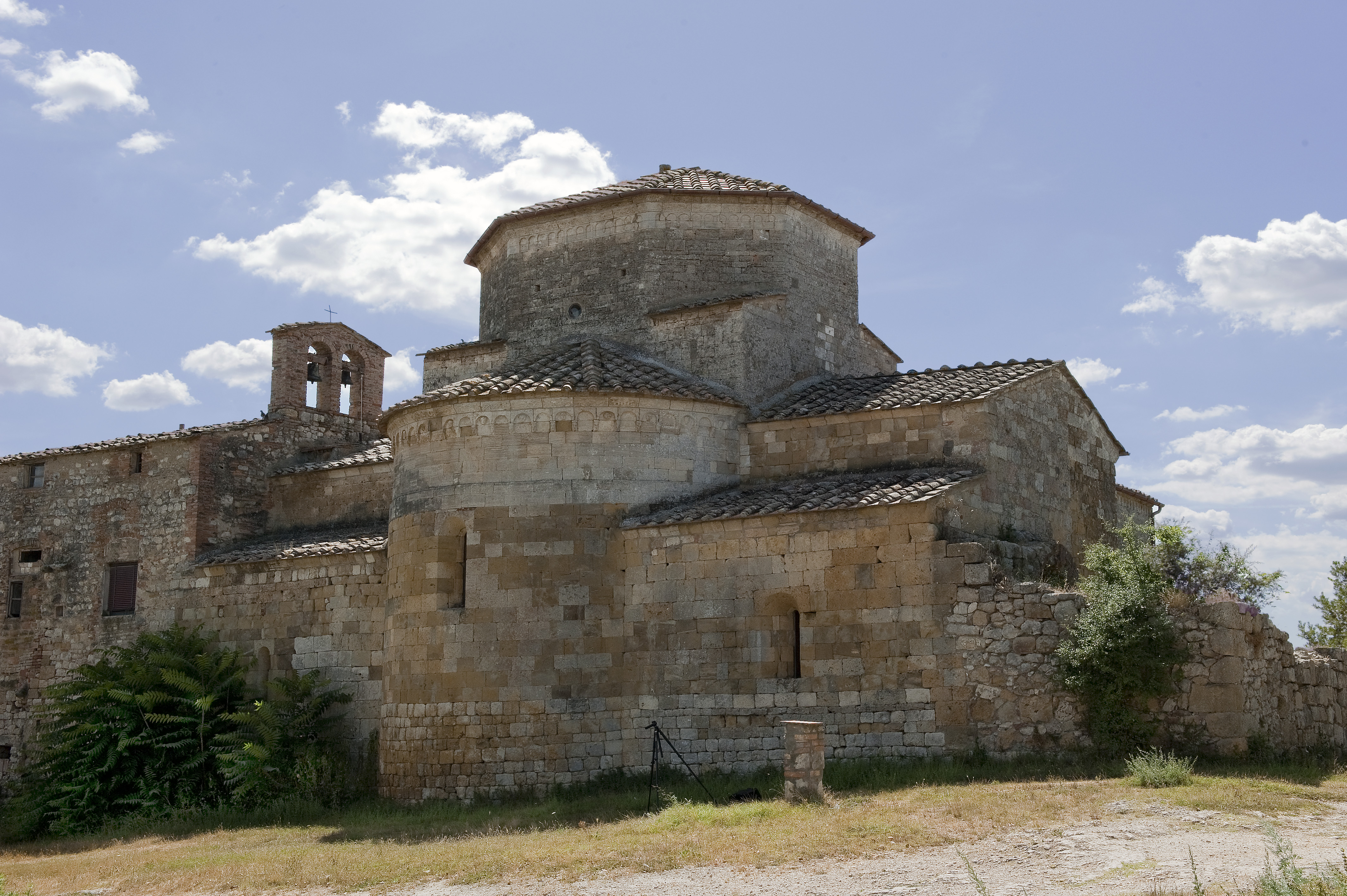 Vediya dell'abside dell'Abbazia di Santa Maria Assunta a Conèo, Colle Val d'Elsa